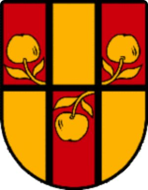 Wappen der ehemaligen Gemeinde Rassach, Steiermark